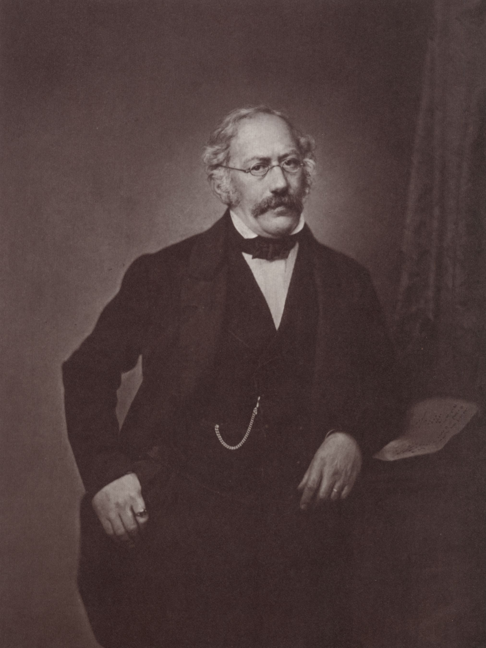 Hanfstaengl, Franz: Joseph Freiherr von Hirsch (1805-1885)